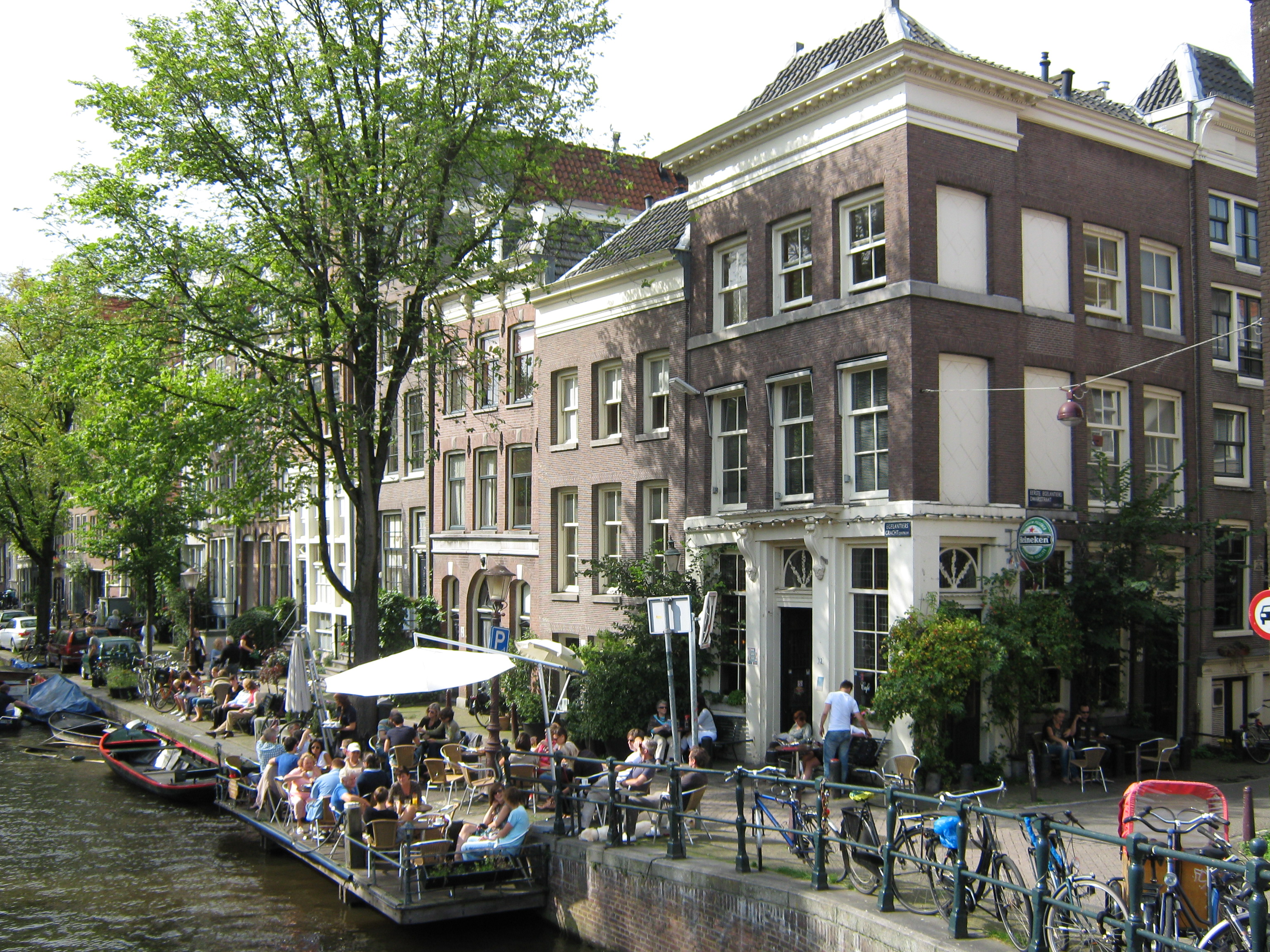 Amsterdam - Egelantiersgracht 14